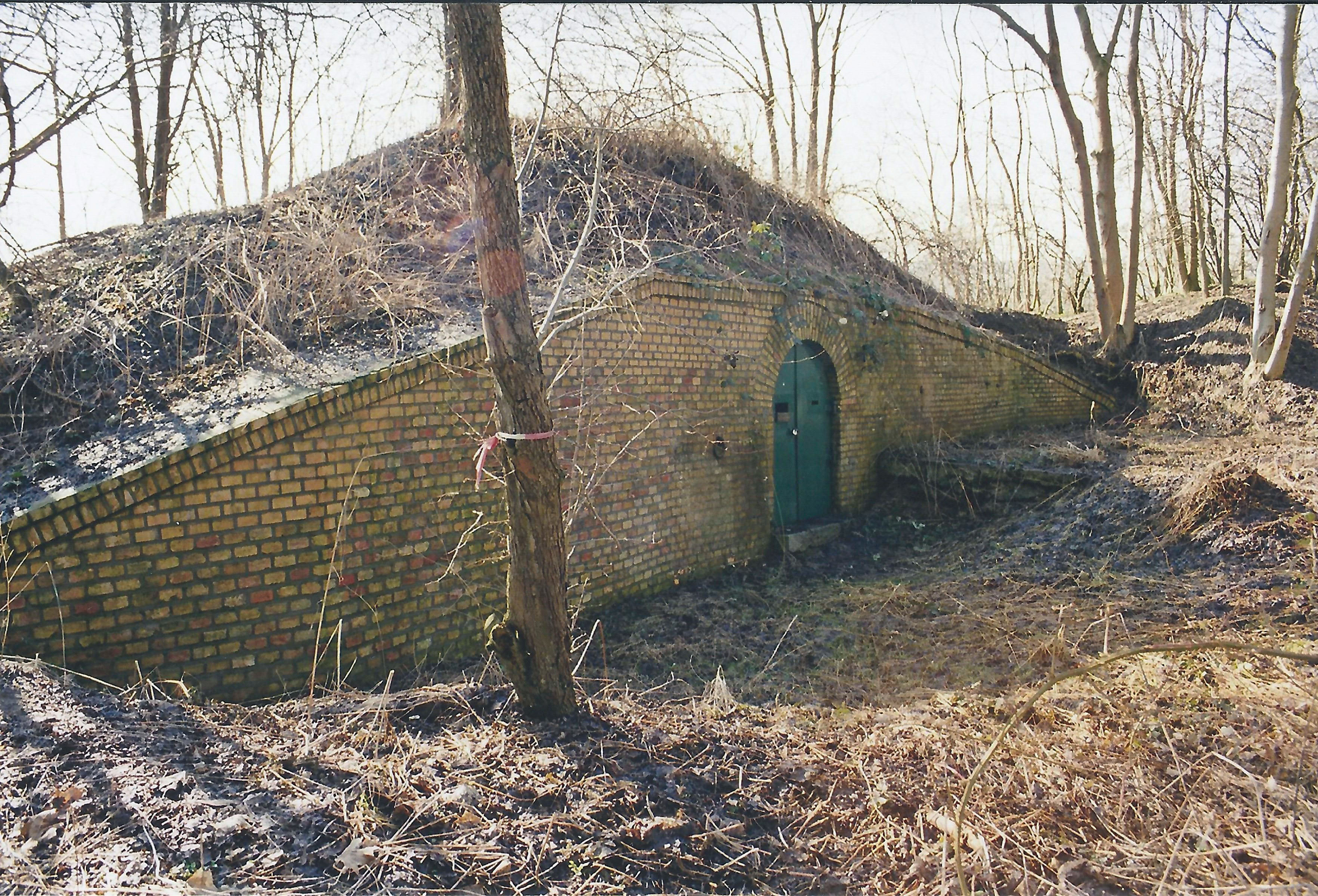 Das als Papierabzug vorliegende Foto habe ich am 5. August 2012 eingescannt und etwas bearbeitet. Das ungefähre Aufnahmedatum steht im Dateinamen; dies ist oft nur der Monat und das Jahr der Filmentwicklung.